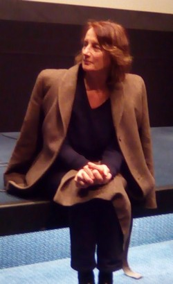 Caroline Champetier à la projection du film "Le Trésor des îles Chiennes", à la cinémathèque française.